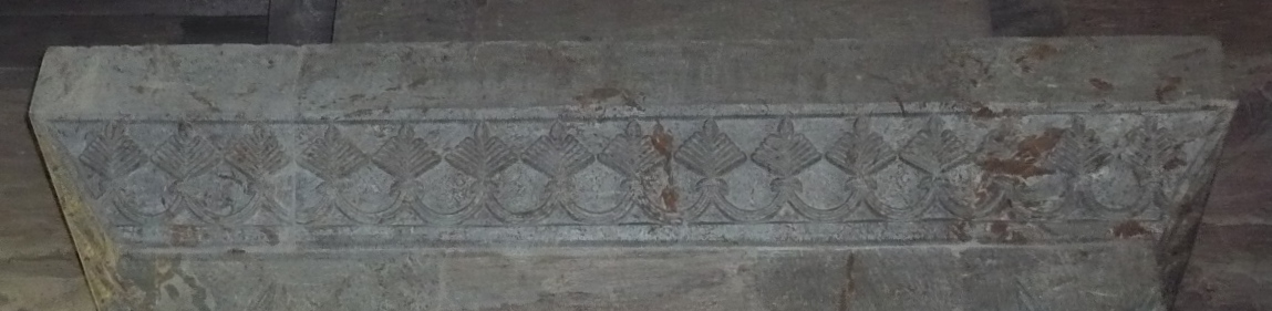 Nordvestre kapitel i skipet i Stavanger Domkirke